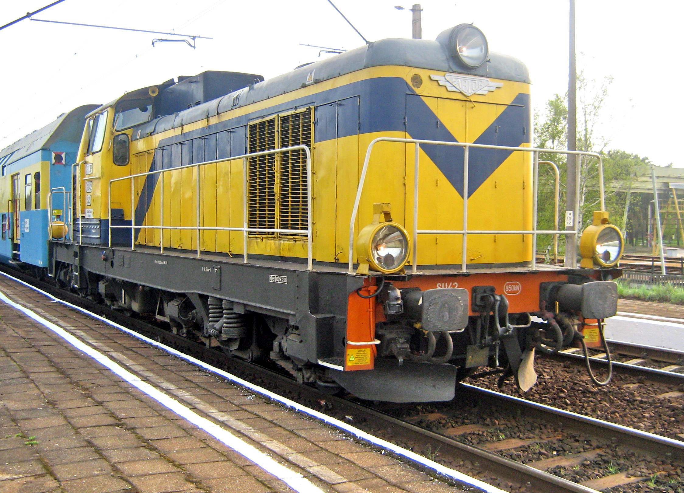 spalinowa lokomotywa uniwersalna SU42-539 przystanek Rynkowo-Wiadukt (koło Bydgoszczy